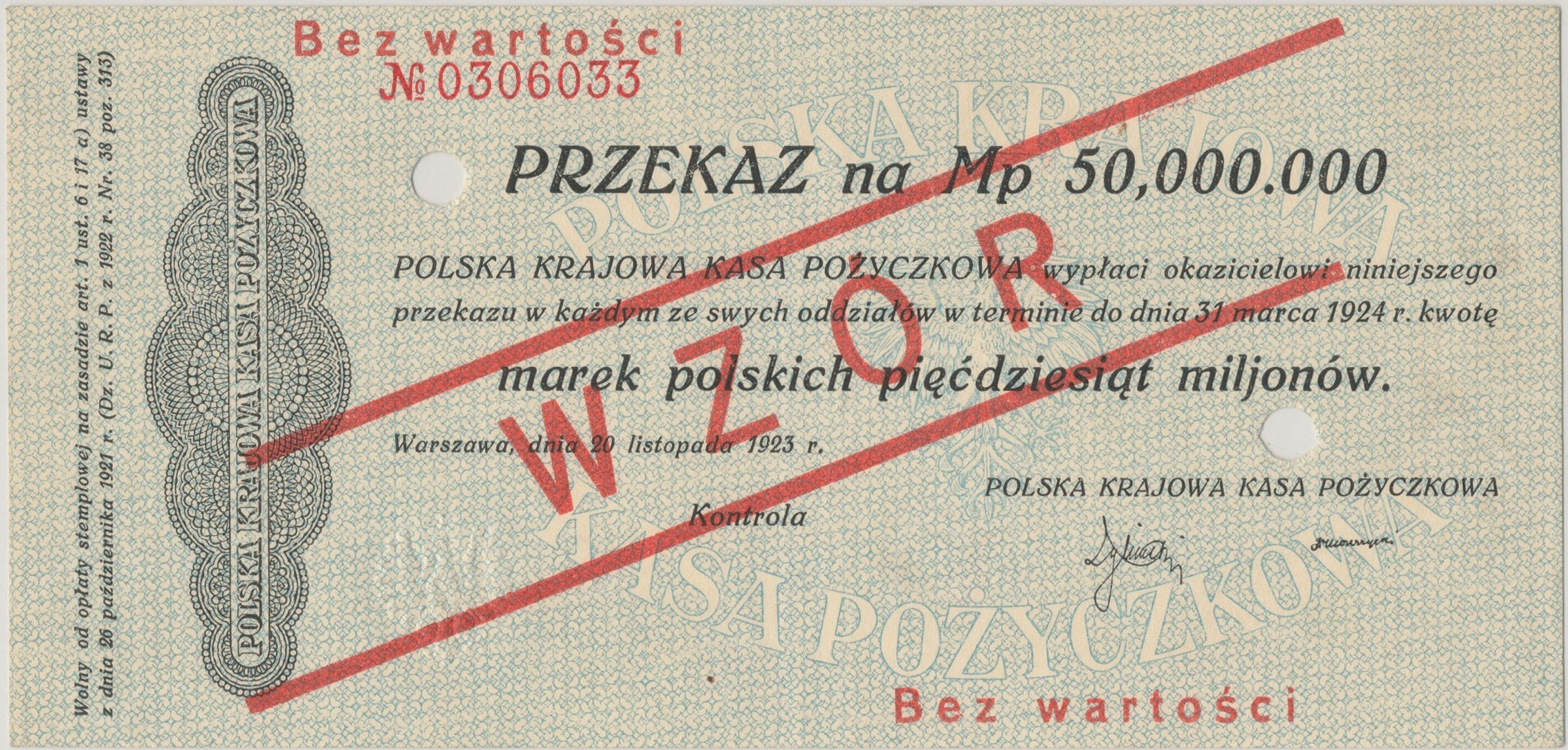 Przekaz 50000000 marek polskich 1924 WZÓR awers